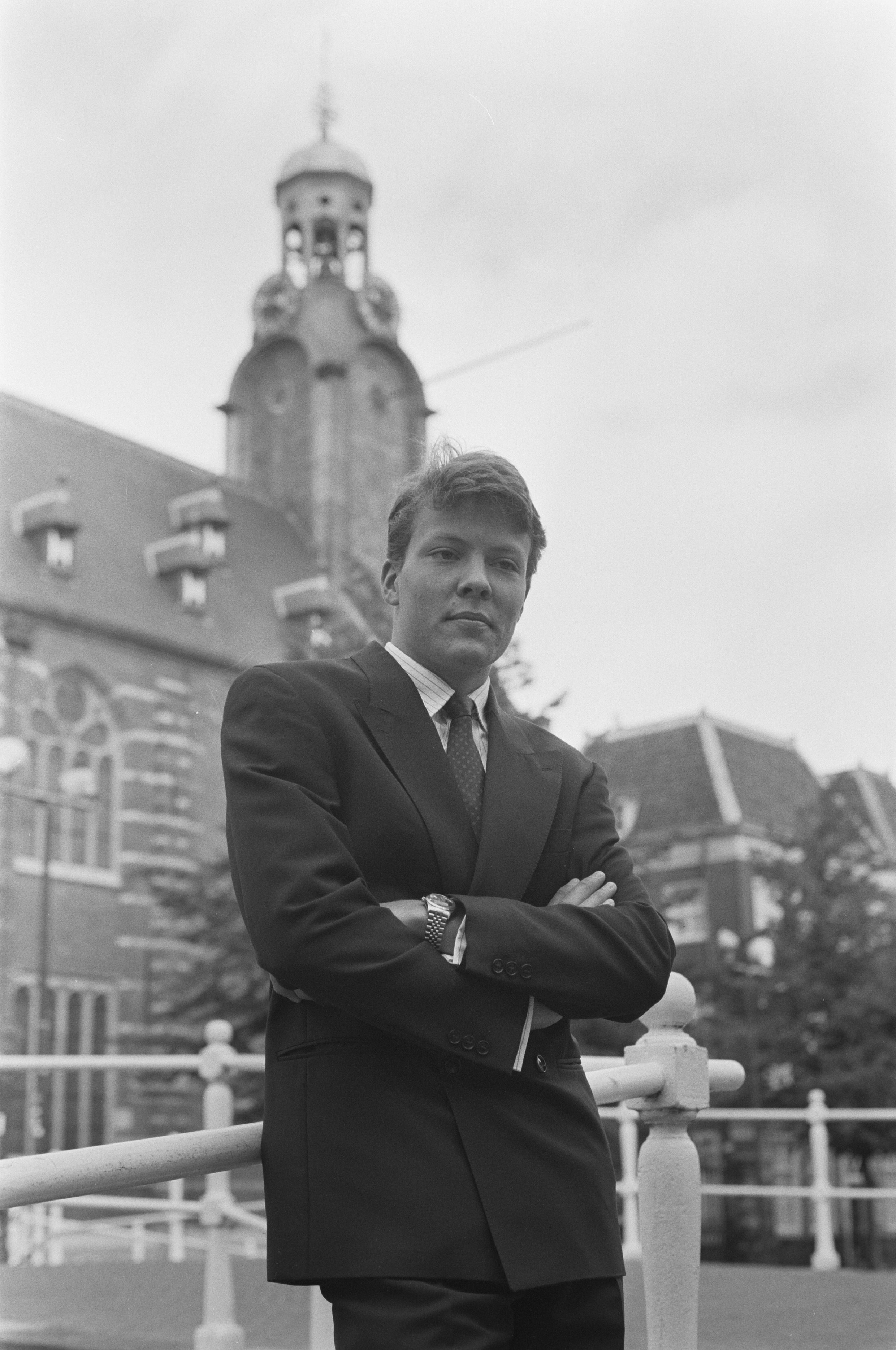 Prins Constantijn begint studie in Leiden; Prins Constantijn voor Akademiegebouw, 1988.